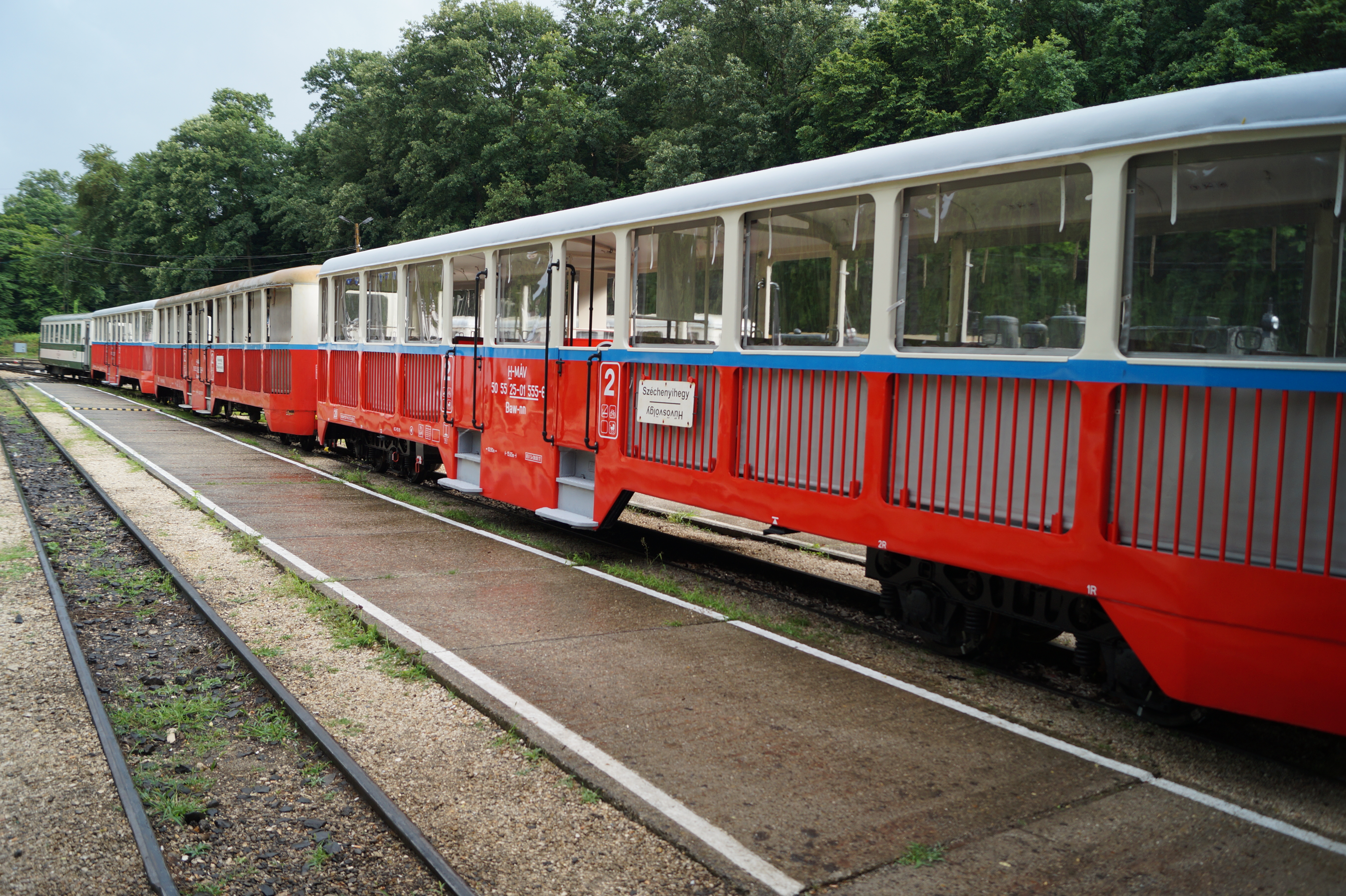 Gyermekvasút - Kindereisenbahn in Budapest